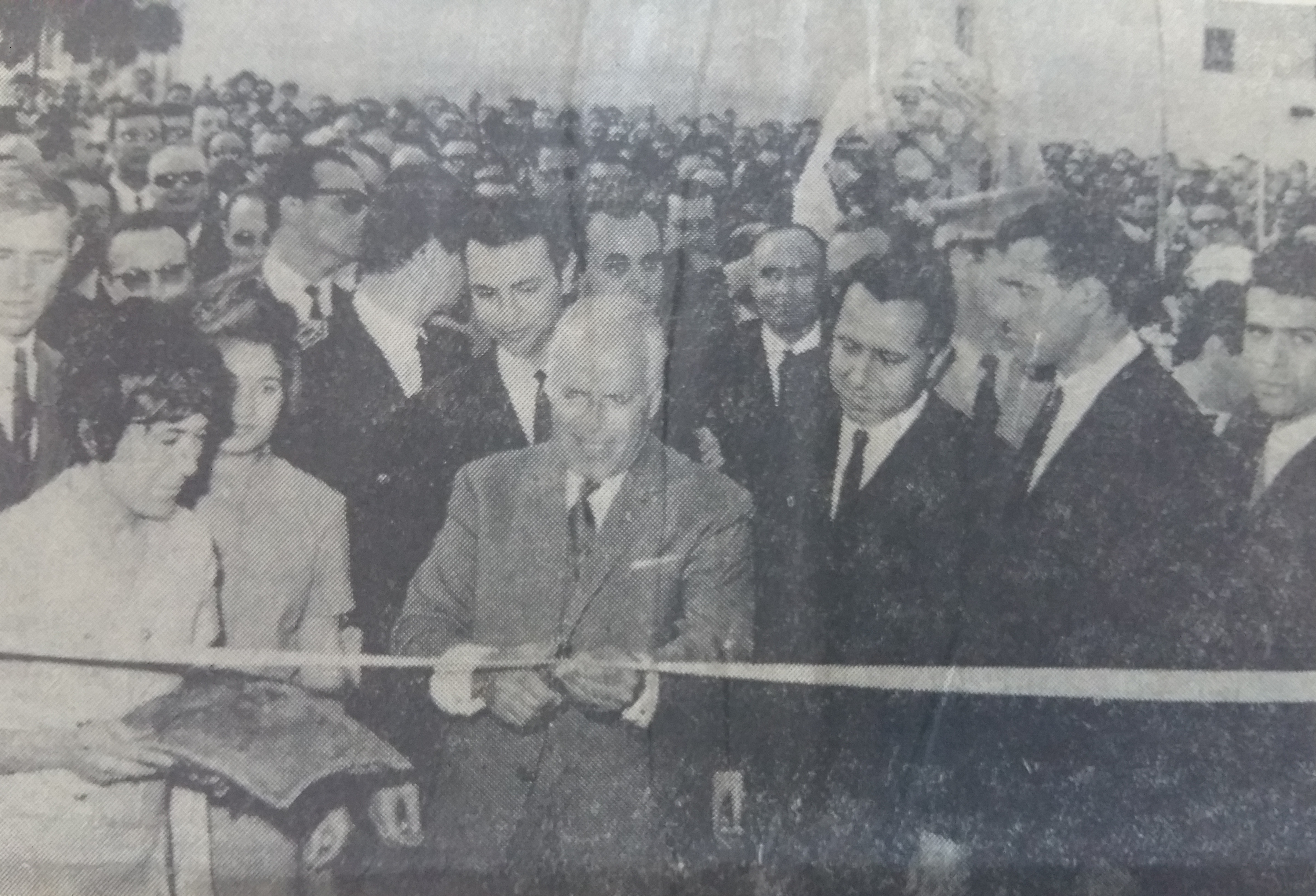 Inauguration de la Banque du Sud par le président Habib Bourguiba